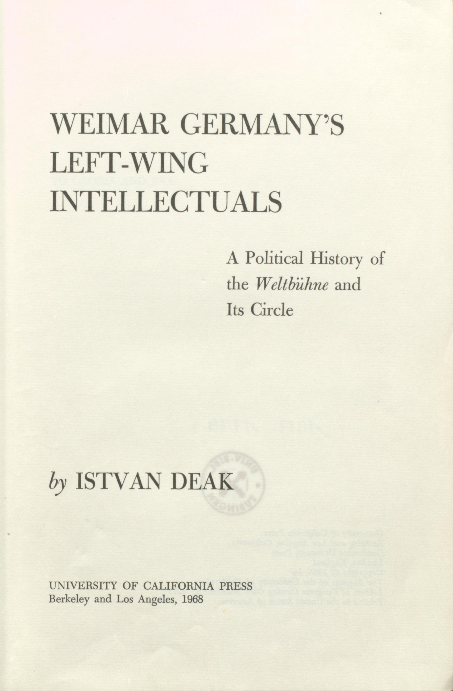 István Deák Weimar Germany’s left-wing intellectuals 1968 title